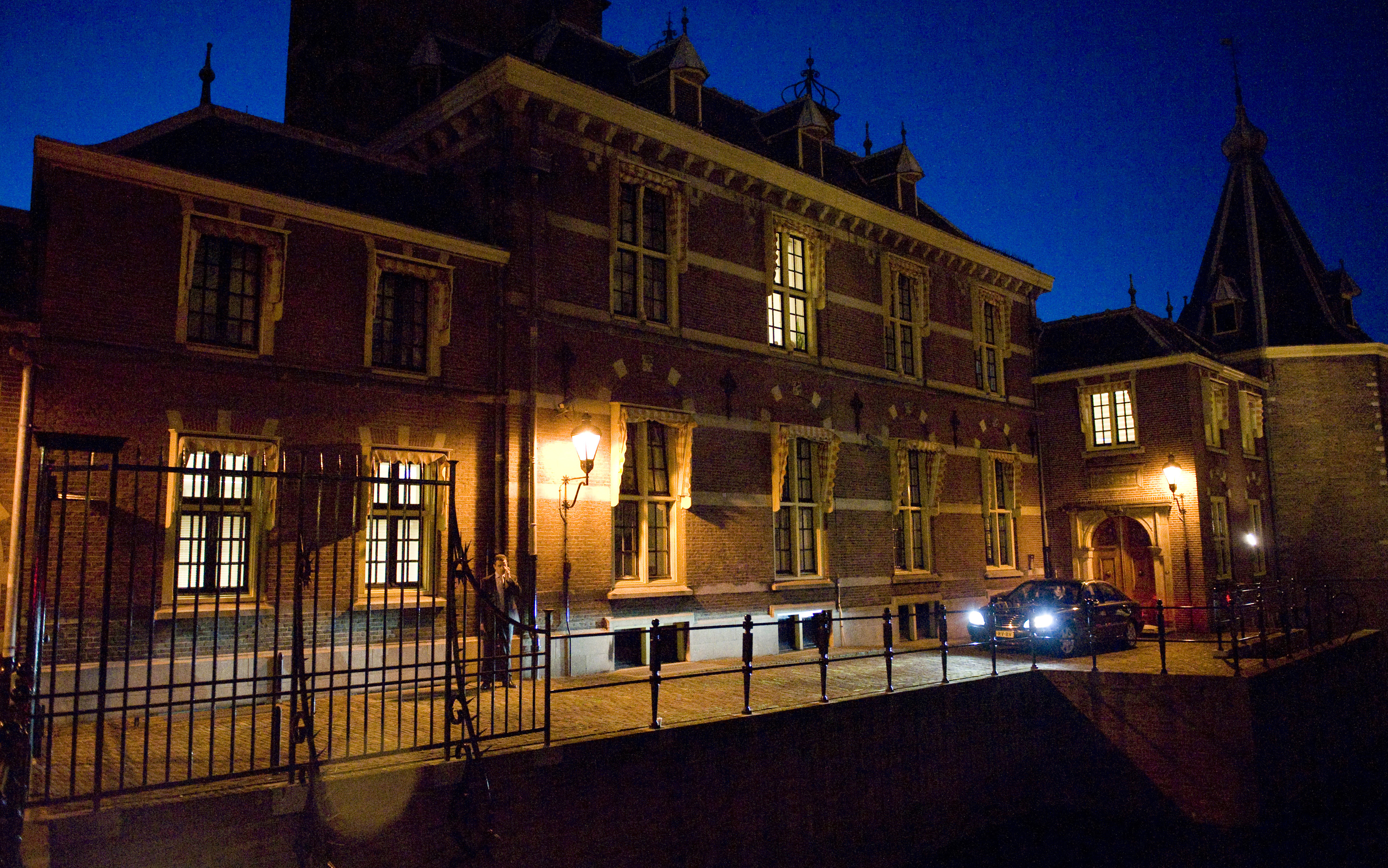 Minister-president Rutte vertrekt vanaf het Torentje naar de Europese Raad in Brussel. Hij spreekt daar met zijn Europese collega’s over innovatie en energiezekerheid, beide cruciaal voor de economie. Daarnaast wordt er ook gesproken over de ontwikkelingen in Egypte.